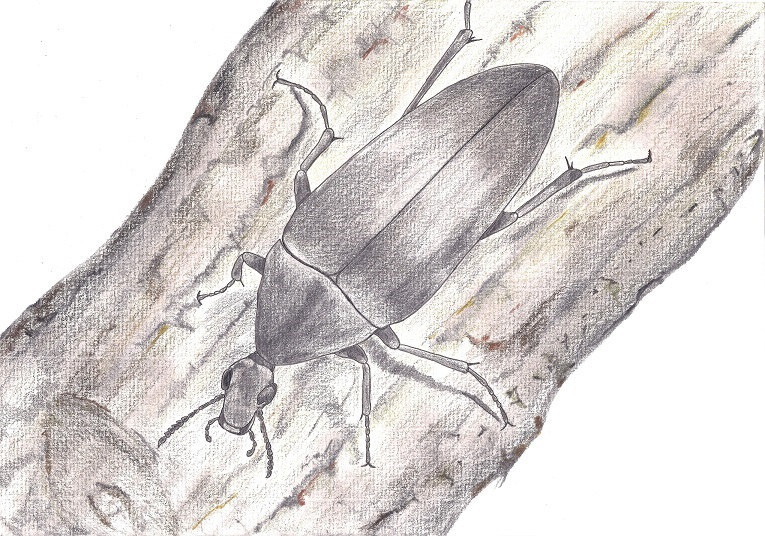 中文（台灣）: 媧皇始源大花蚤